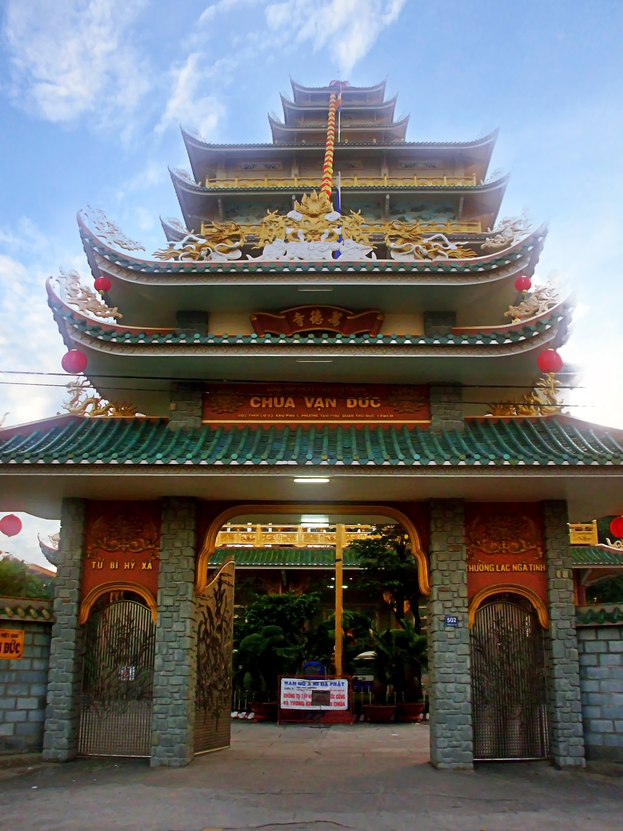 Tam quan Chùa Vạn Đức lo HT Thích Trí Tịnh khai sơn, hiện ở số 2, khu phố 5, phường Tam Phú, quận Thủ Đức, Thành phố Hồ Chí Minh